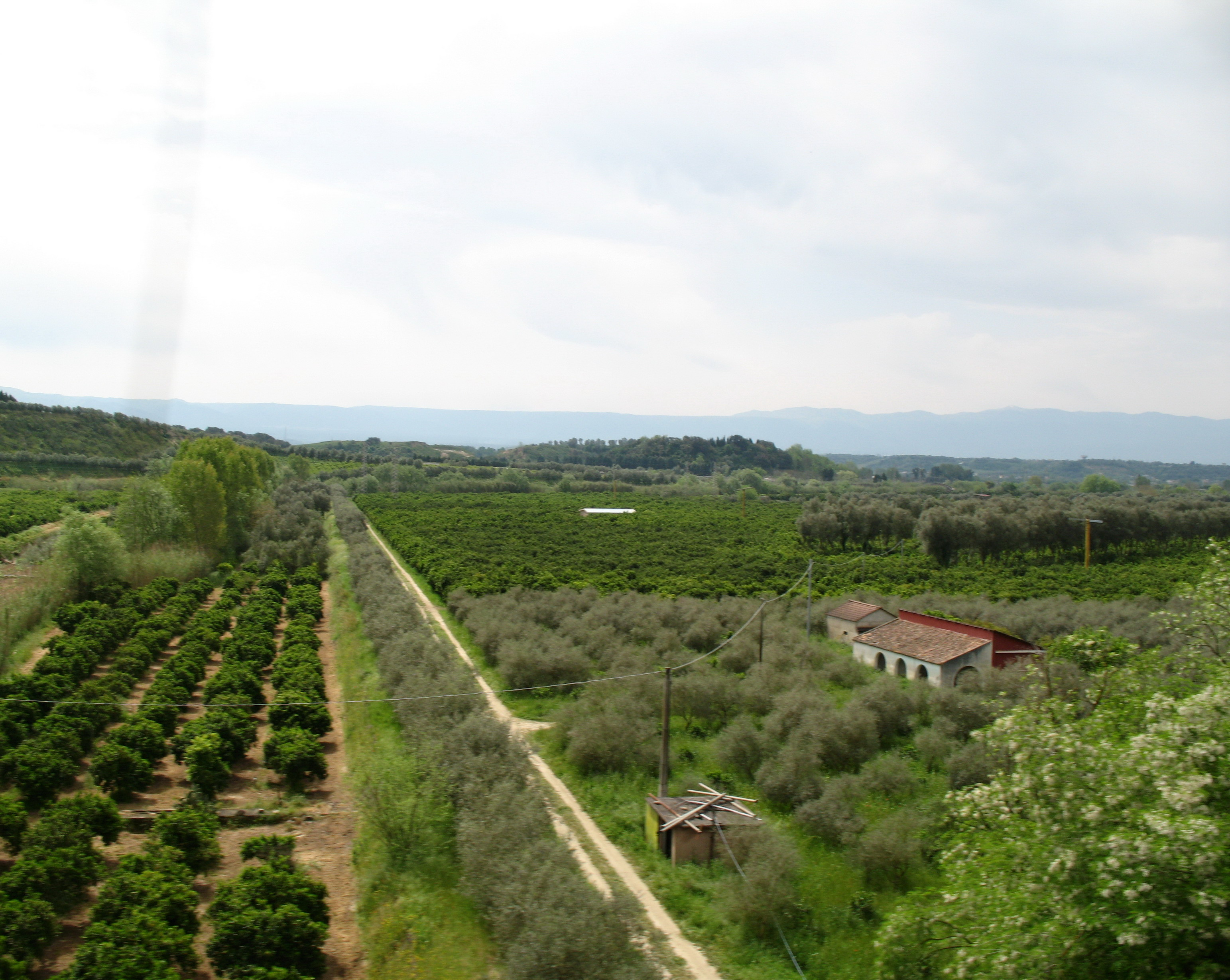 Piana di Gioia Tauro, Agrumeti vicino Rosarno